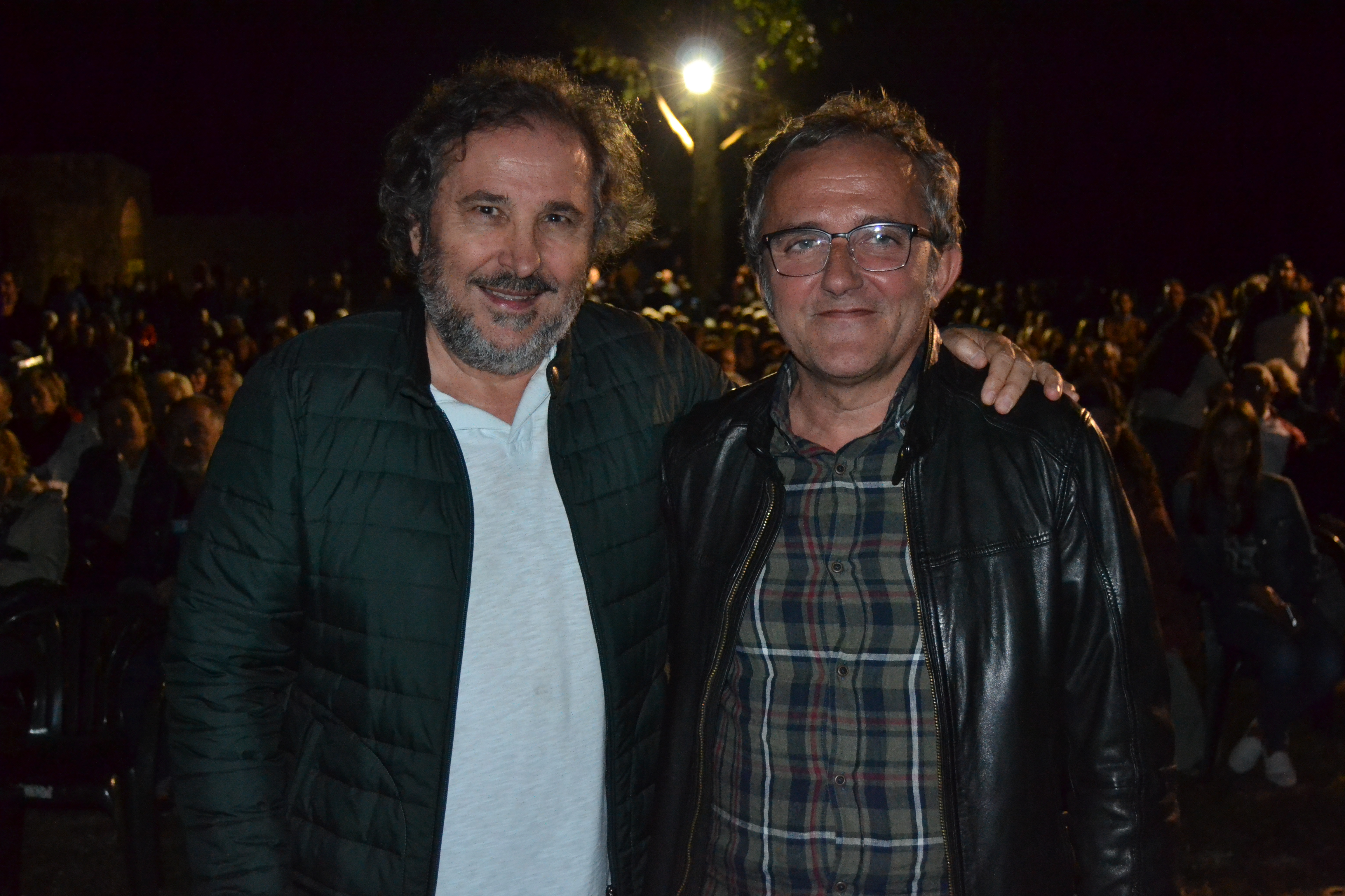 Ignacio Vilar e Antonio Durán "Morris" na protección da película A Esmorga, na Guarda (Pontevedra)